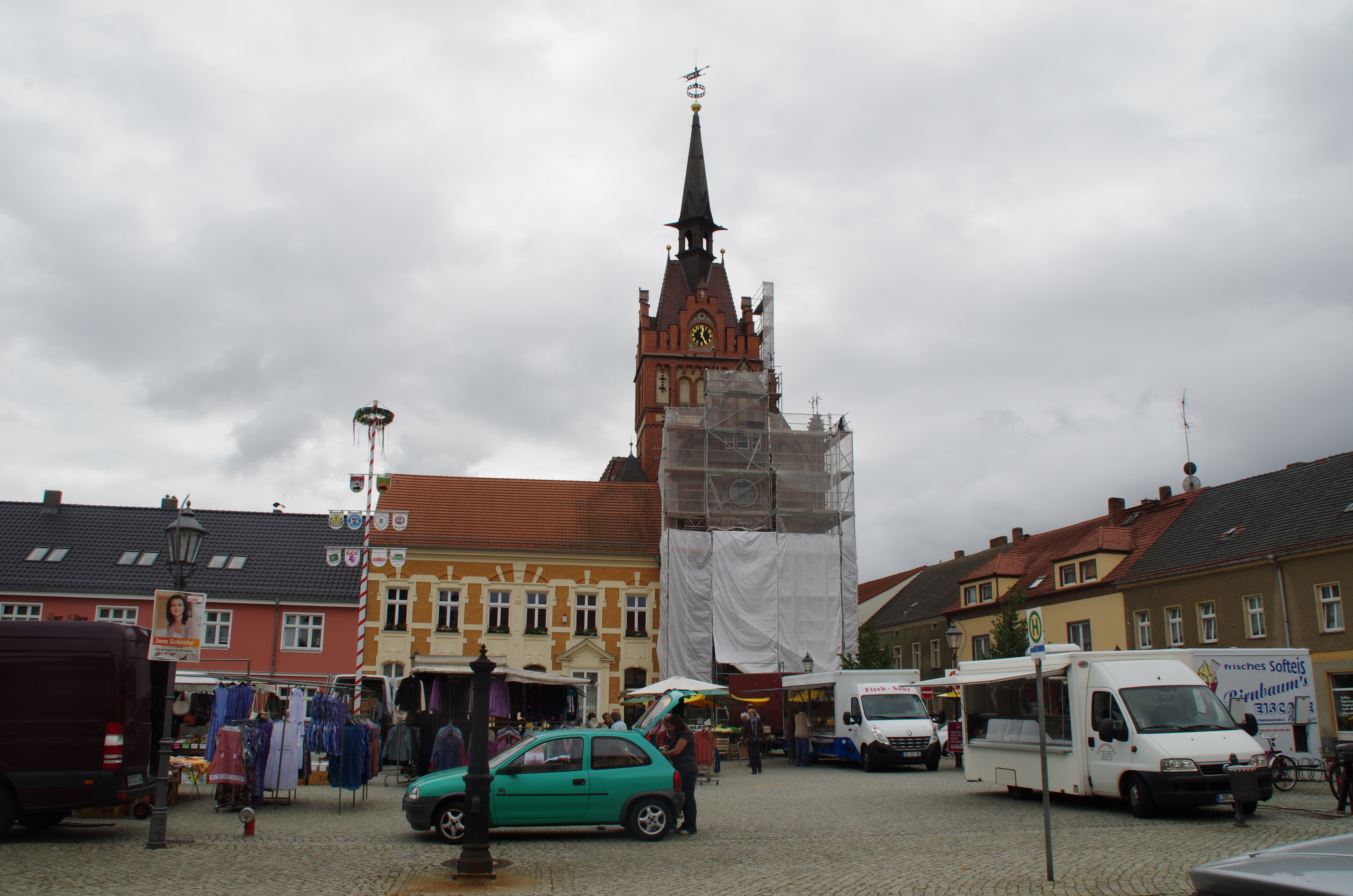 Golßen in Brandenburg. Das Rathaus steht unter Denkmalschutz.